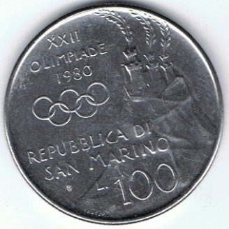 100 Lire San Marino - 1980 - XXII Olimpiade